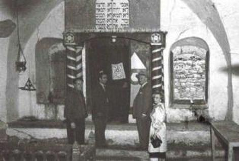 Synagogue in Peki'in, Israel.